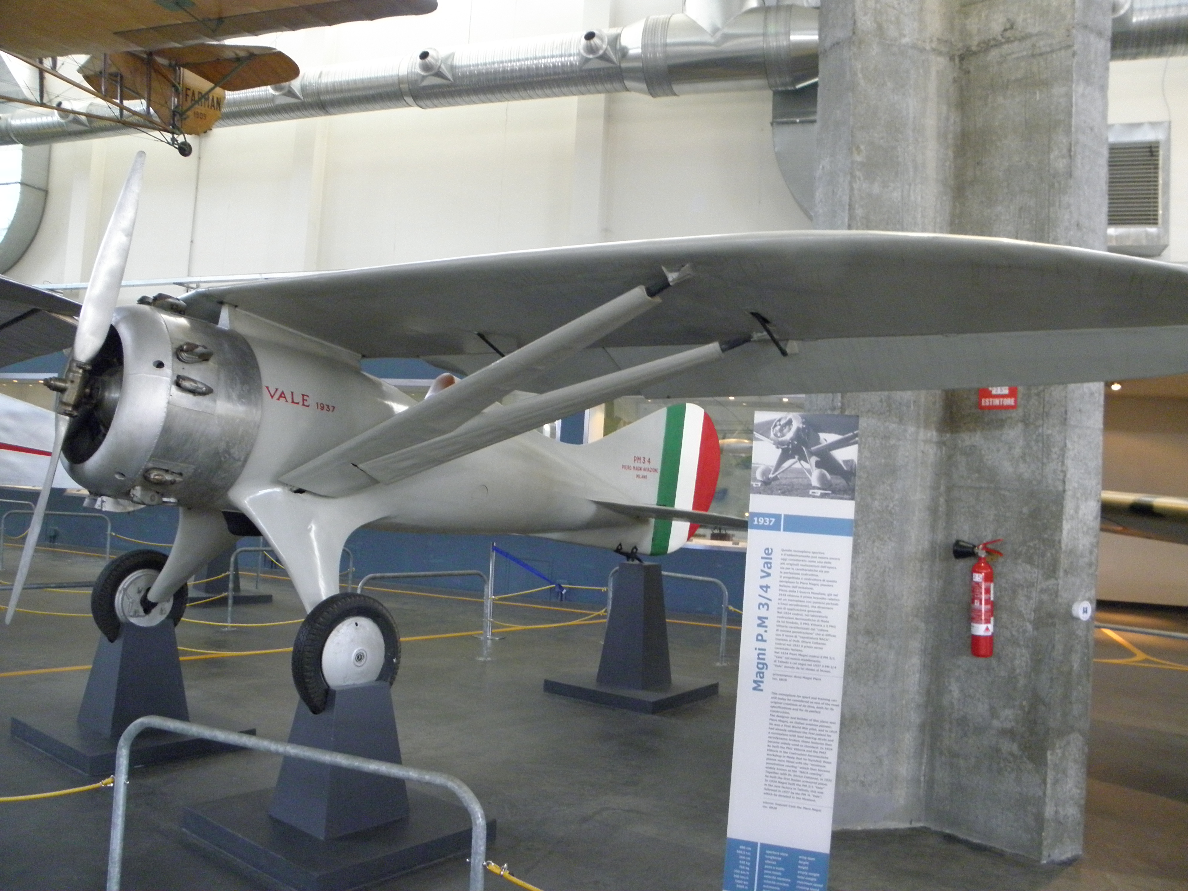 Milano, Museo Nazionale della Scienza e della Tecnologia: Magni PM-3-4 Vale.